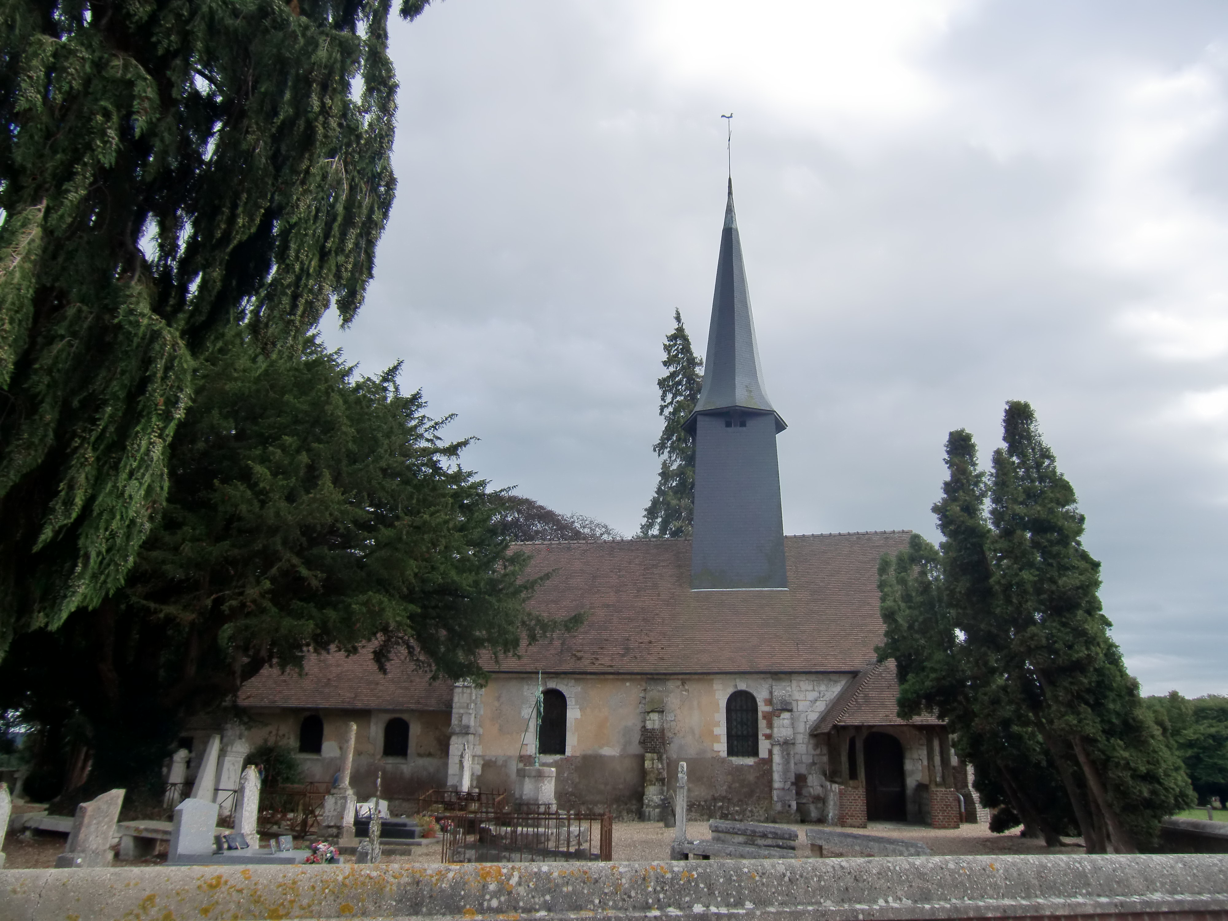 Église Saint-Sauveur de Boscherville (Bourgtheroulde-Infreville) - Eure - Normandie - France.